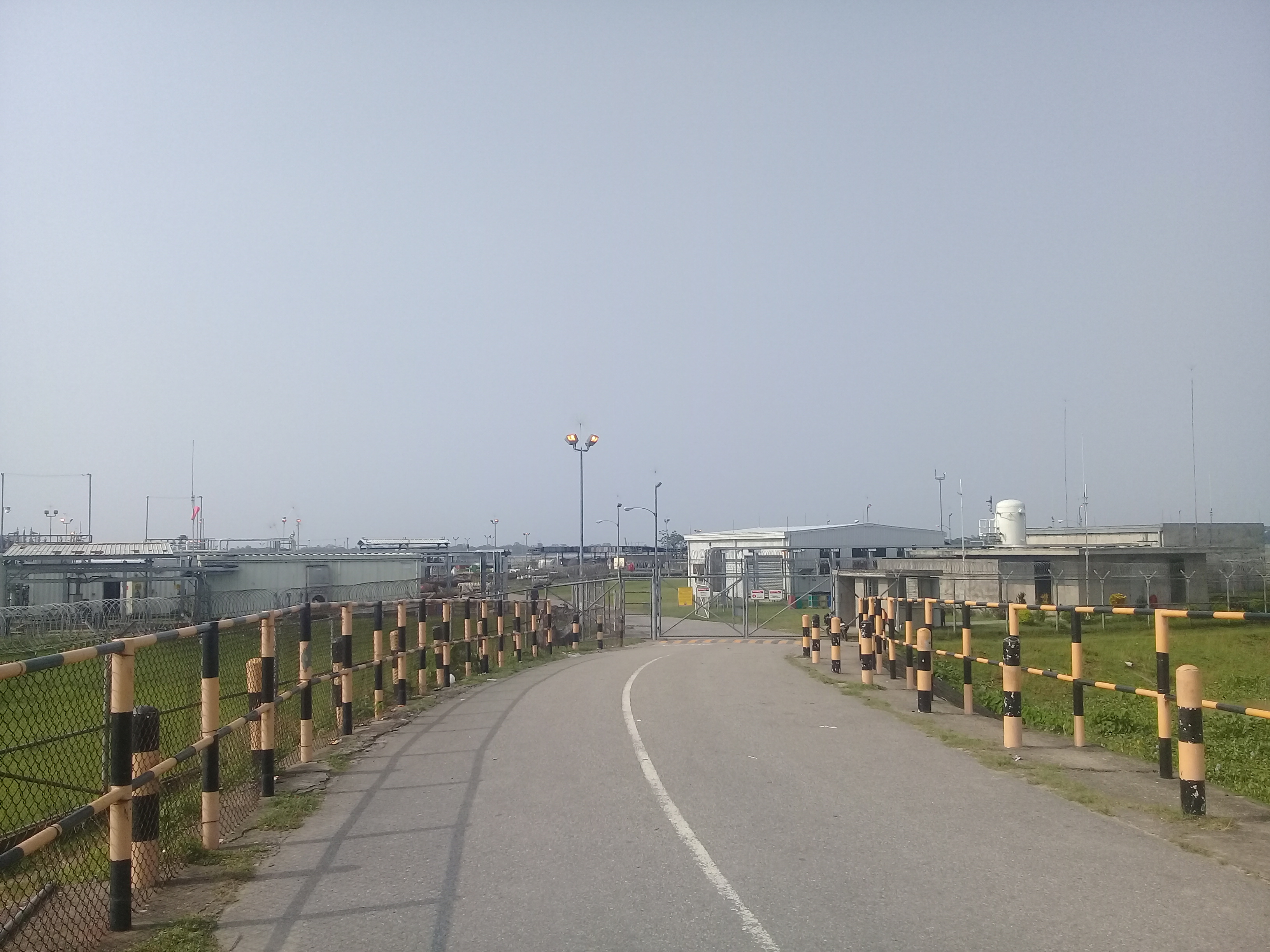 বিবিয়ানা গ্যাস ফিল্ড